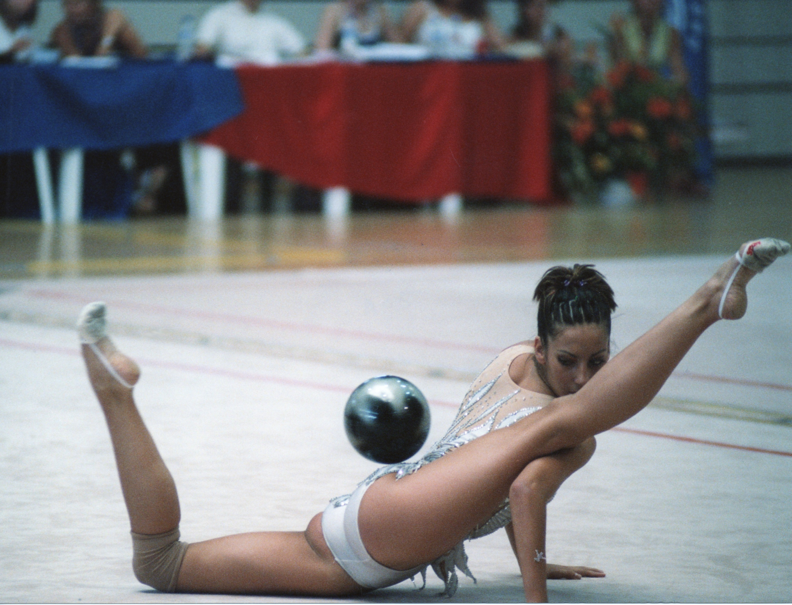 La gimnasta española Almudena Cid realizando el "Cid Tostado" en el Campenato de España de Gimnasia Rímica de 2002 en Leganés. Foto cedida por Mina Tostado García.